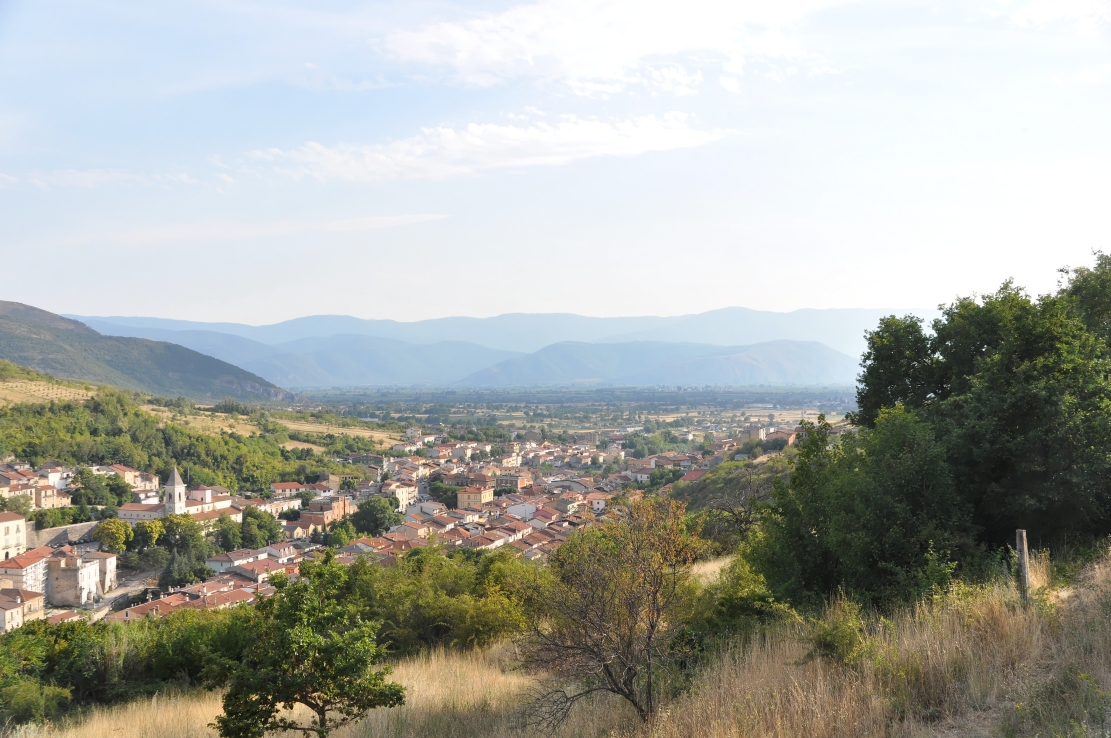 Pescina 2012